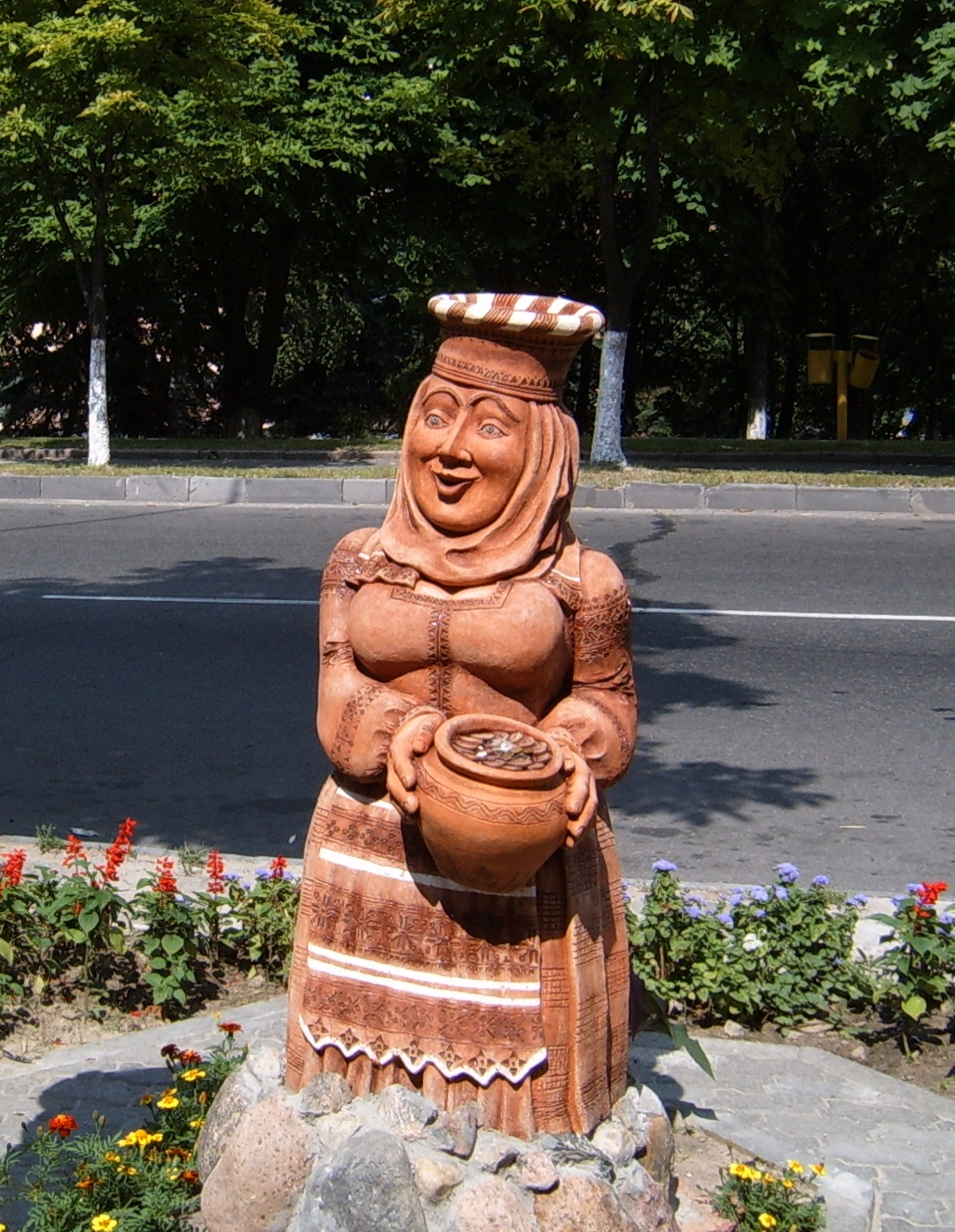 Скульптура в Мозыре